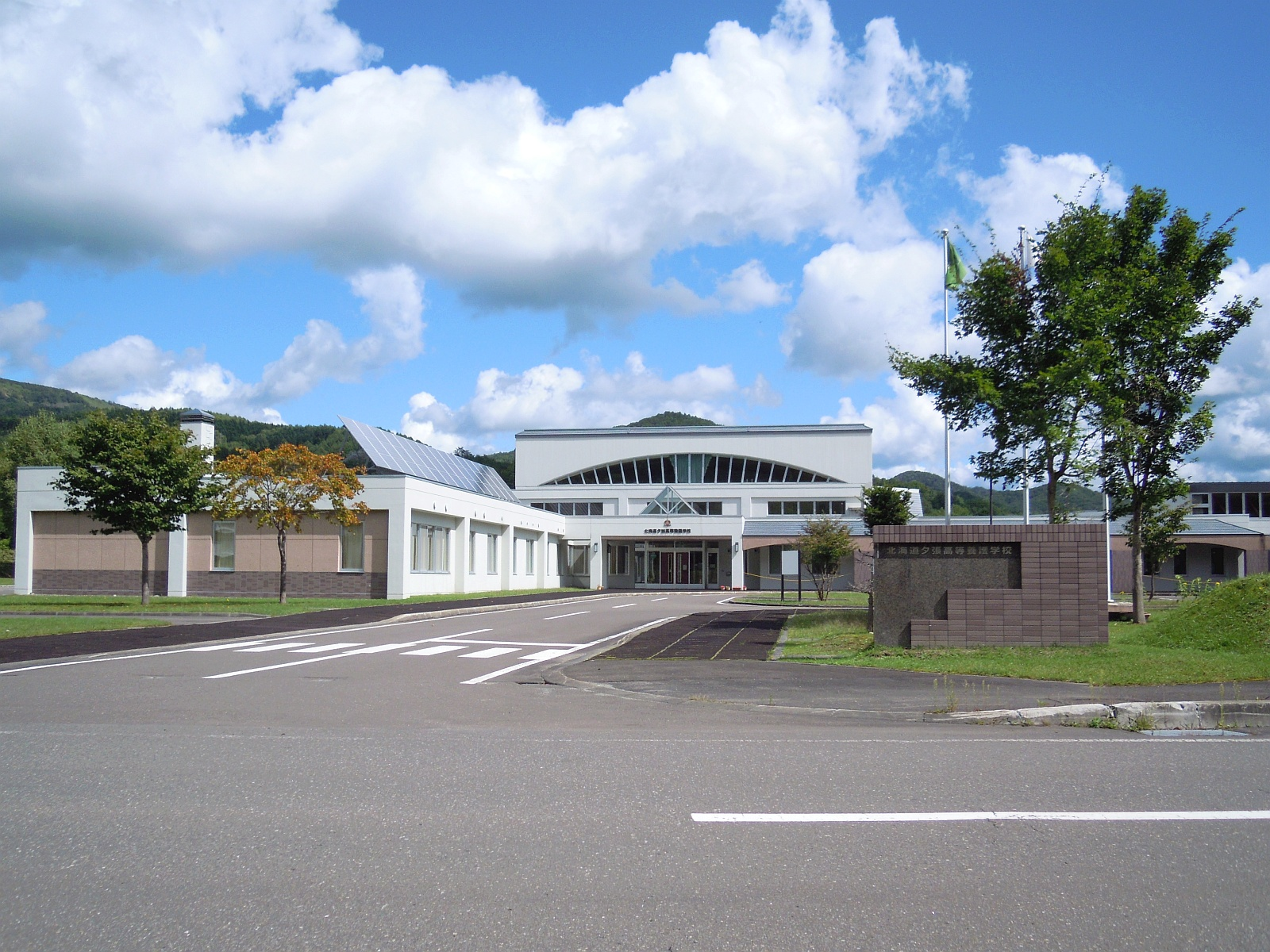 北海道夕張市にある北海道夕張高等養護学校の正門と校舎遠景。